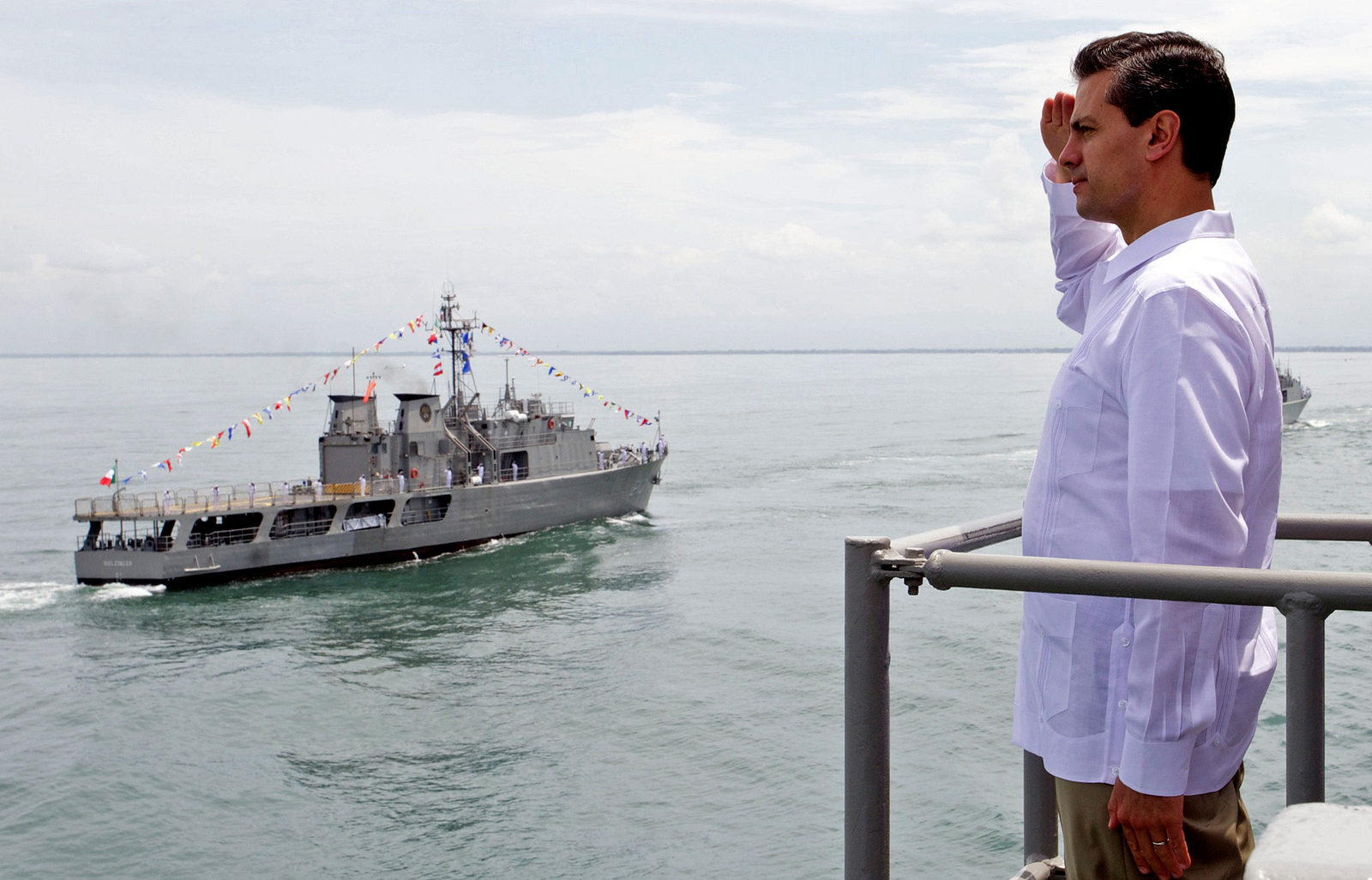 Día de la Marina. Tapachula, Chiapas. 1 de junio de 2013.